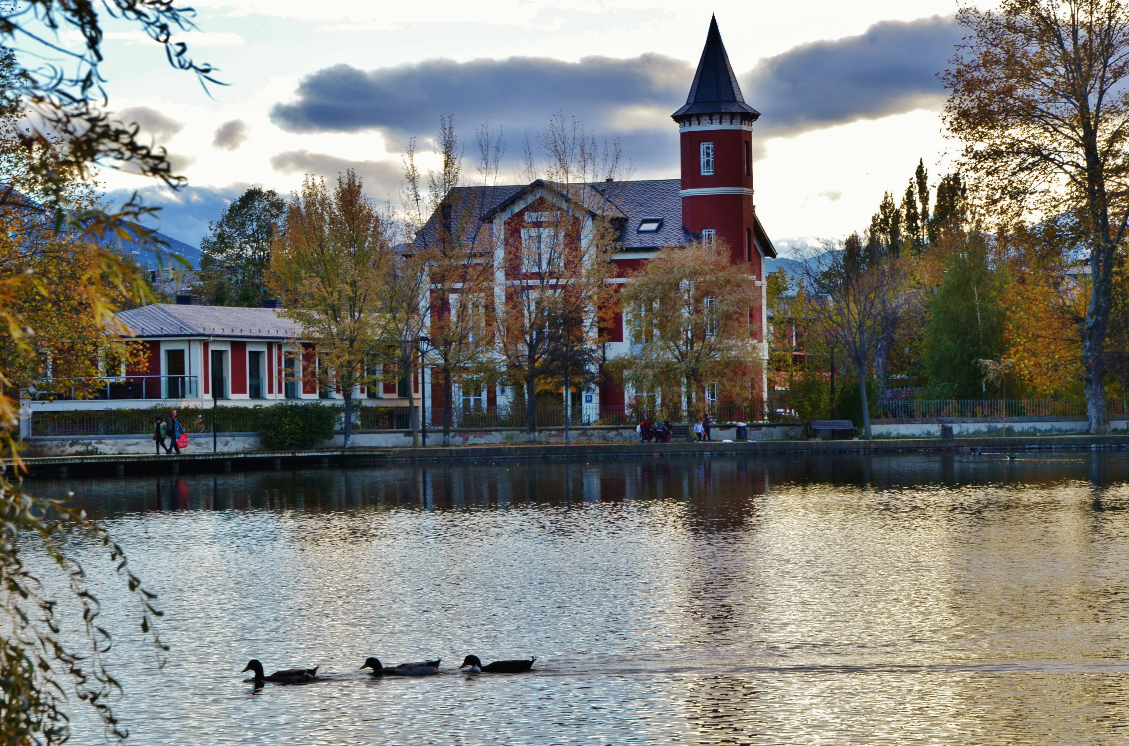 Villa Paulita (Puigcerdà)